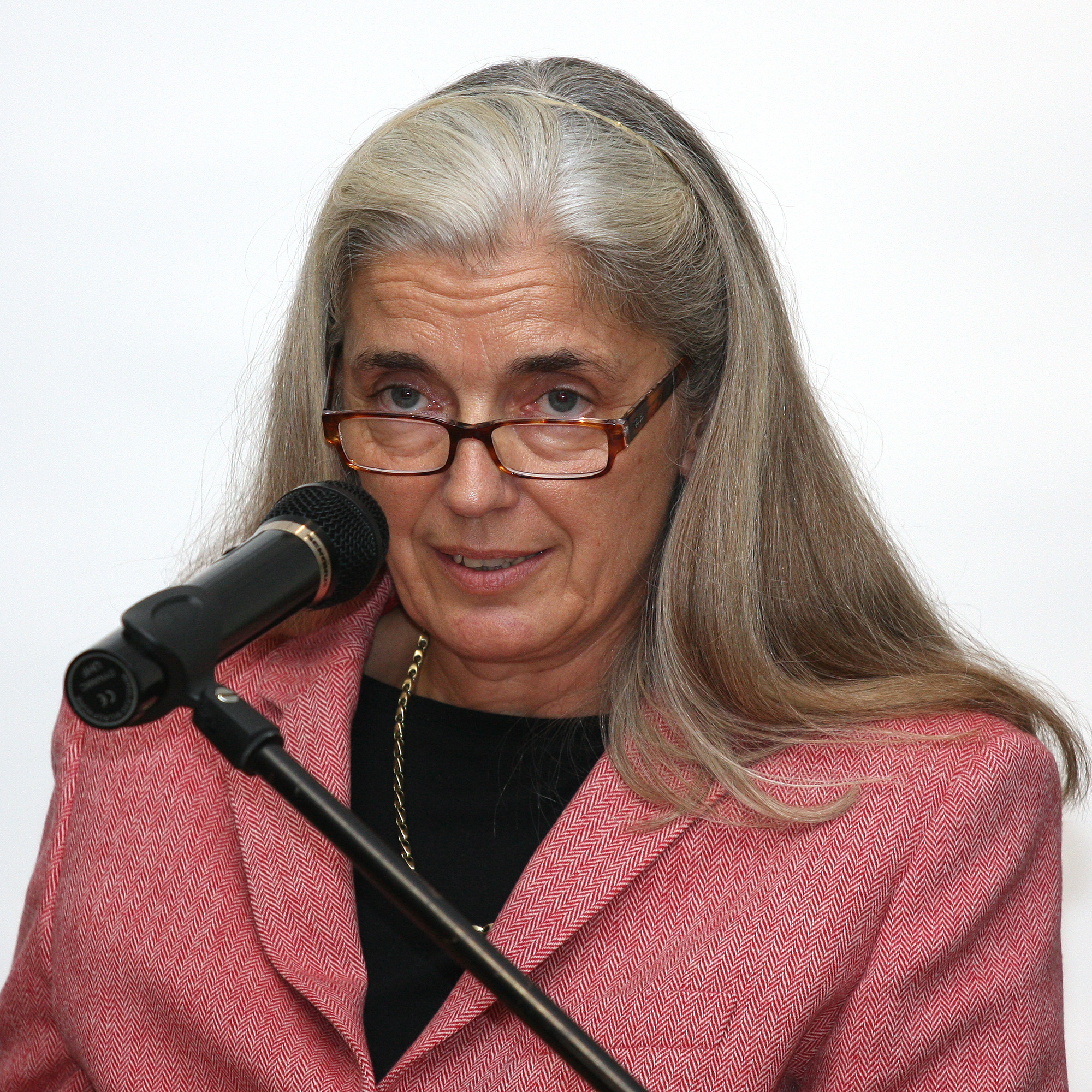 Isabel Pfeiffer-Poensgen, Generalsekretärin der Kulturstiftung der Länder, bei der Eröffnung der Ausstellung „Köln 14 Uhr 58, geborgene Schätze aus dem Historischen Archiv“.